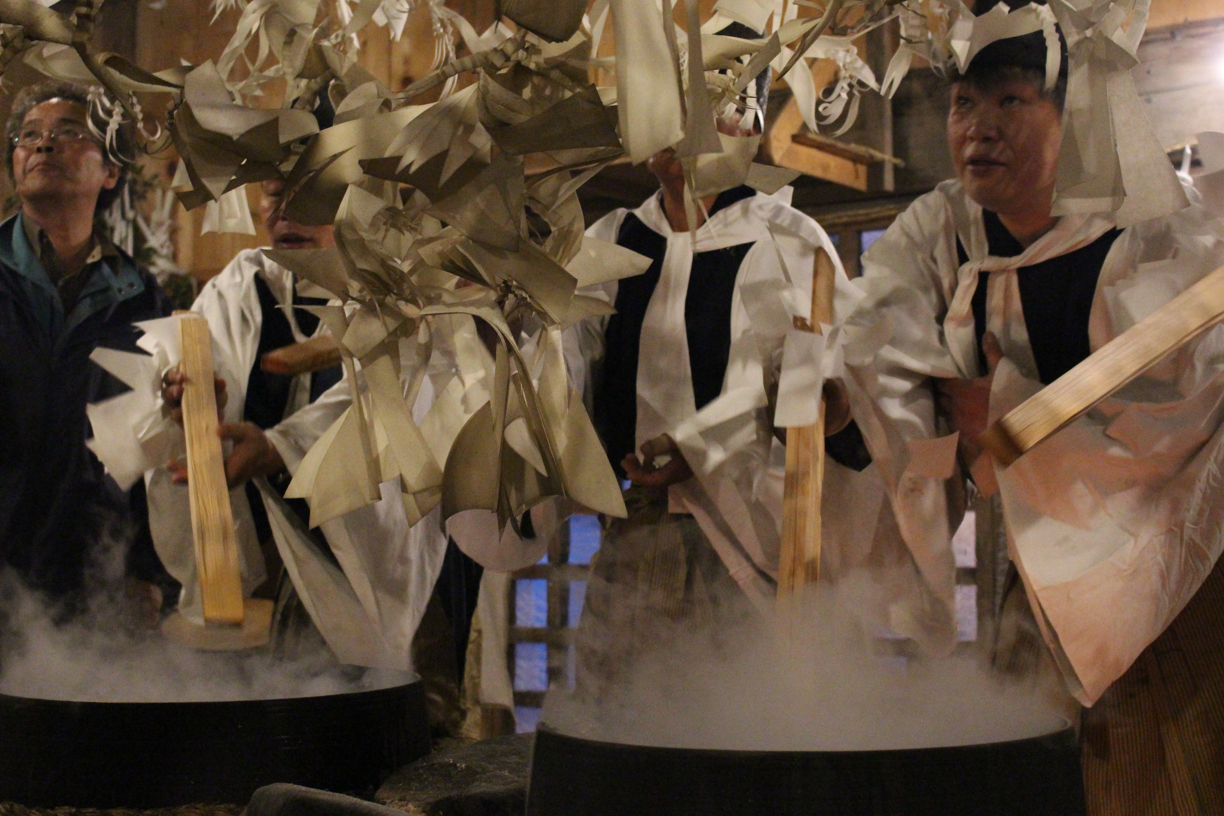 神様が宿る湯木と言う幣束が付いた木を湯に浸すことにより、神々に湯を捧げます。 これを、湯召しと呼びます。